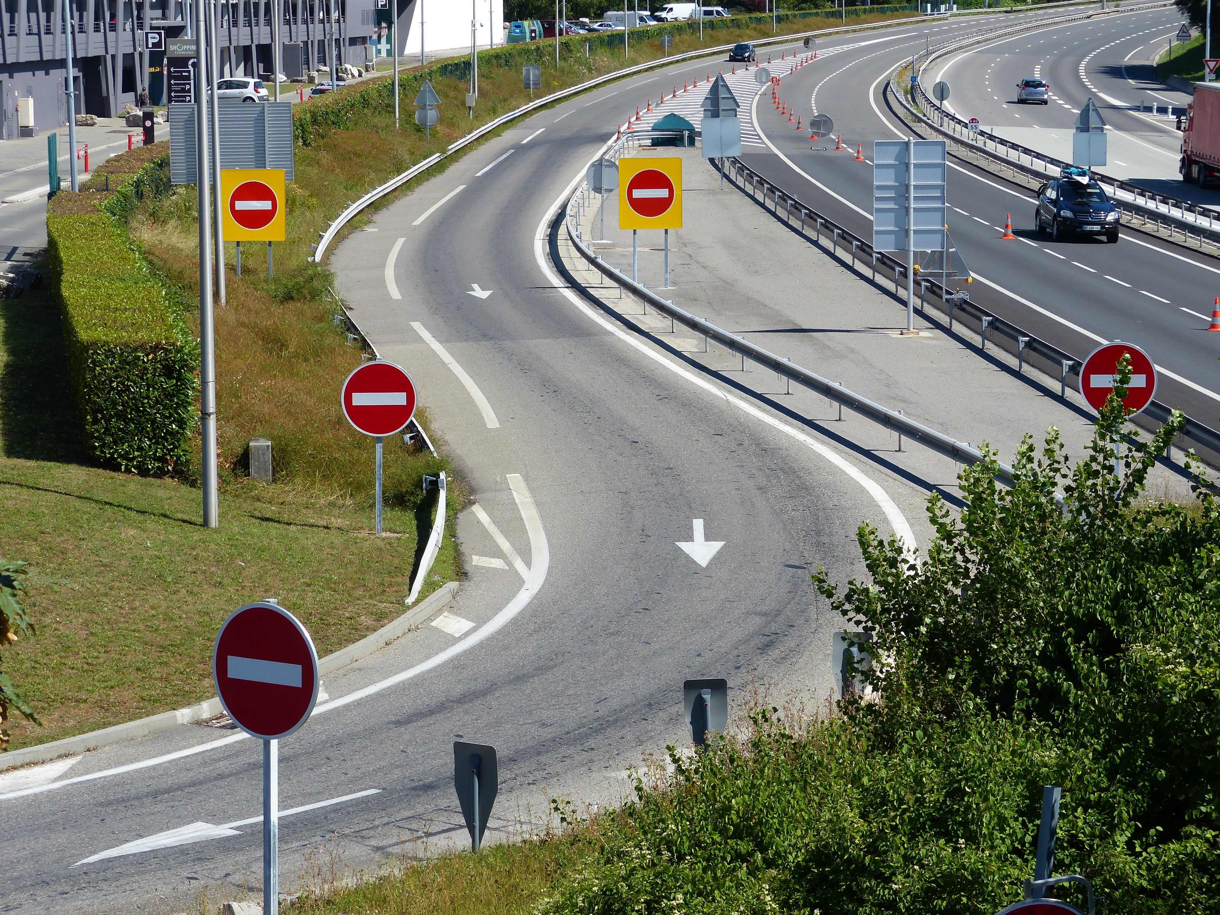 Panneaux B1 et B1j à la sortie 14 Annemasse de l'A40